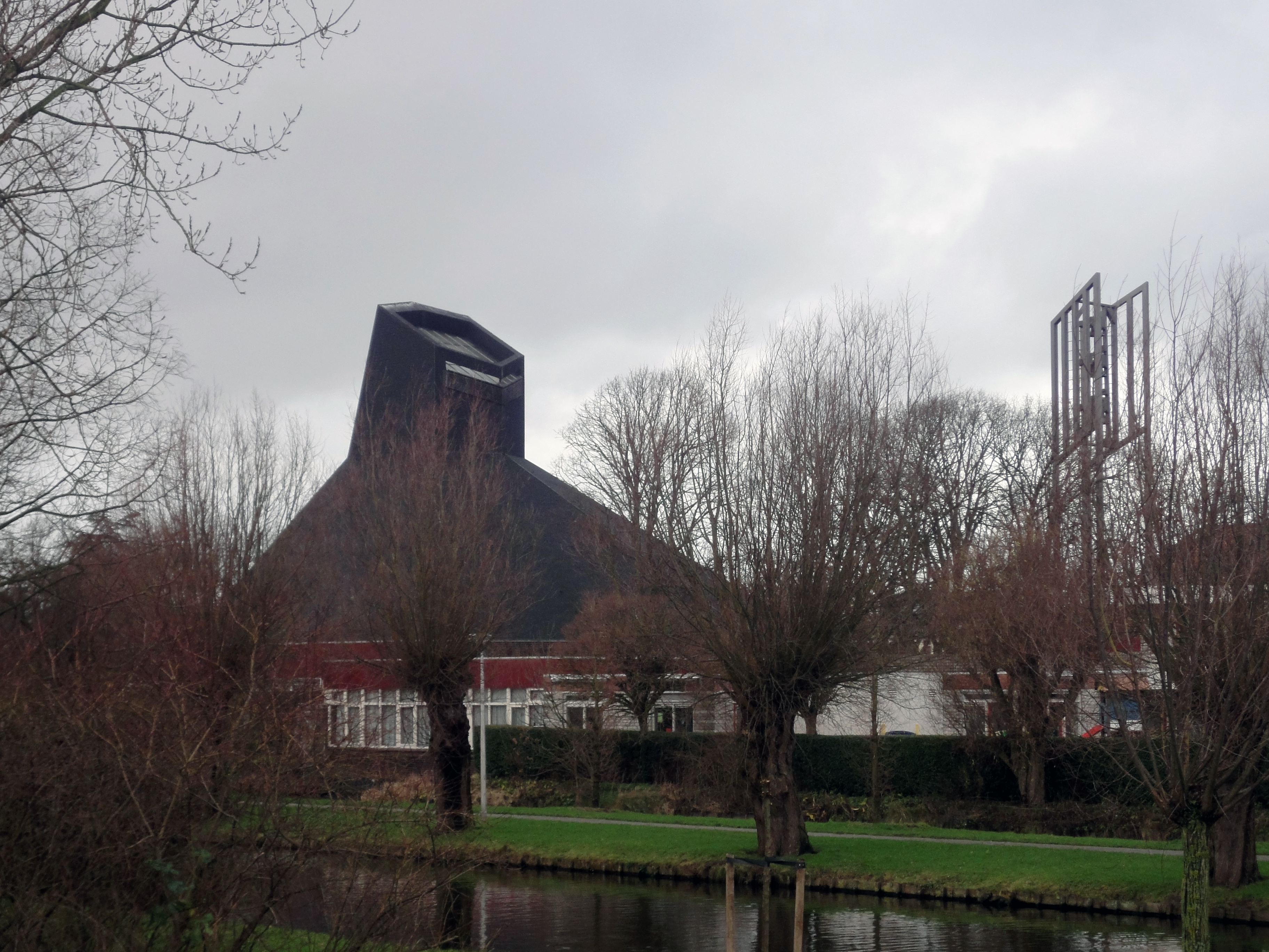 Saint Josephchurch a.k.a. "De Kolenkit" in Wateringen.